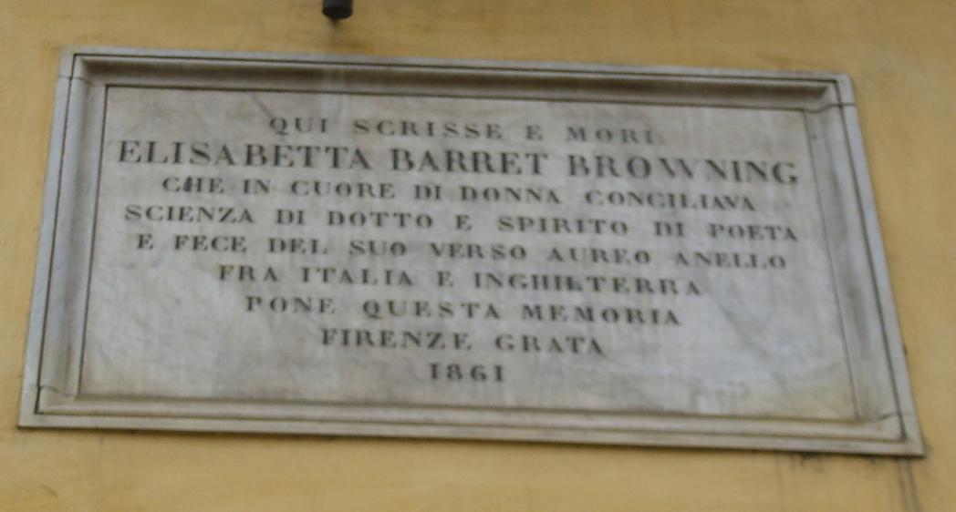 Casa guidi, targa elizabeth barret browning